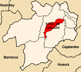 Distrito de Santiago de Chilcas